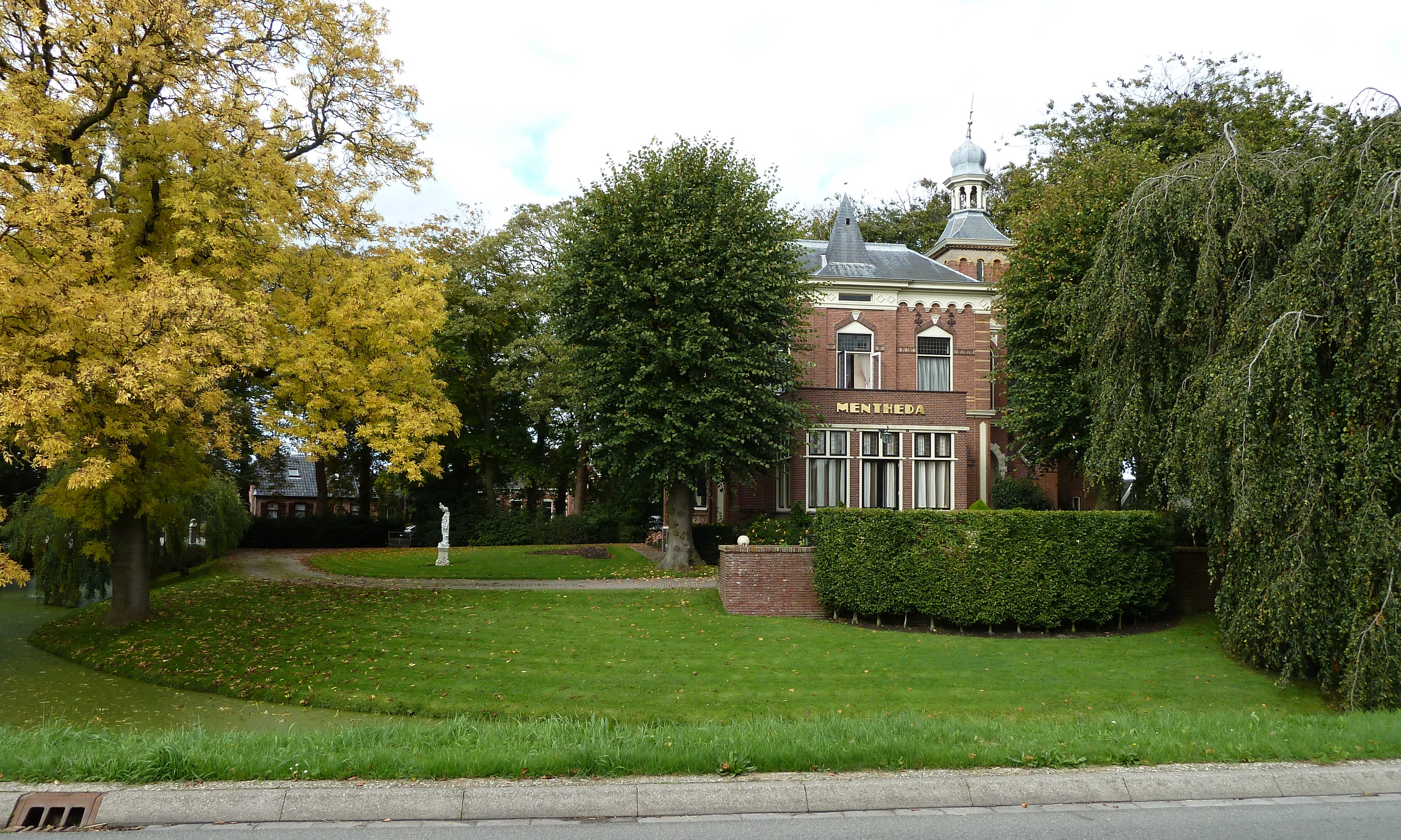 Villa Mentheda (1905; tegenover borgterrein vroegere borg Mentheda) aan de Menthedalaan 5 in Middelstum (Groningen, Nederland)